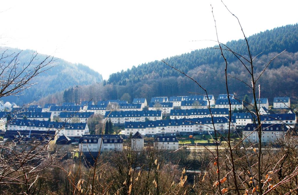 Gesamtblick Papenberg/Knerling in Altena